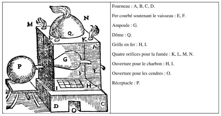 Distillation per inclinationen par le feu, Della Porta, Distillation, 1609